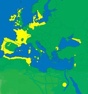 Em amarelo assinalam-se as primeiras construções megaliticas